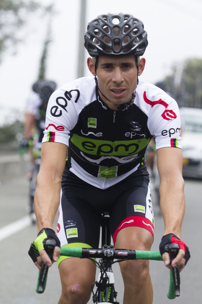 Rafael Infantino con el equipo EPM UNE en 2014